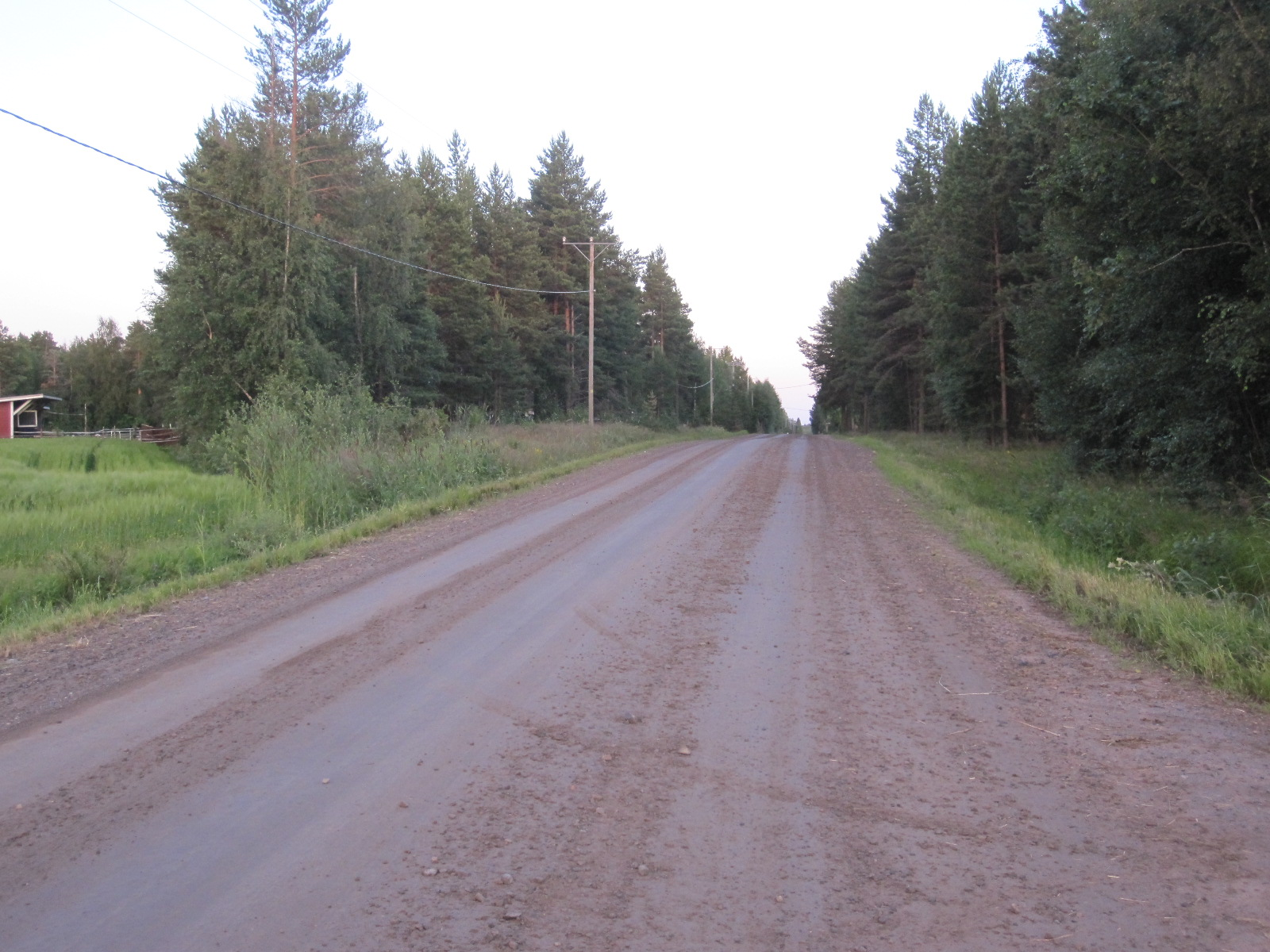 Oulunsalon Letto, Letontie (yhdystie 18669). Näkymä etelään (Limingan suuntaan) Koivukarintien risteyksestä.